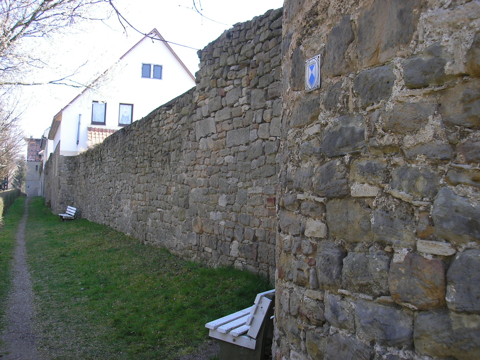 Reste der Stadtmauer von Remda (Thüringen).